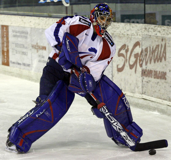 Eddy Ferhi, gardien de l'équipe de France de hockey sur glace